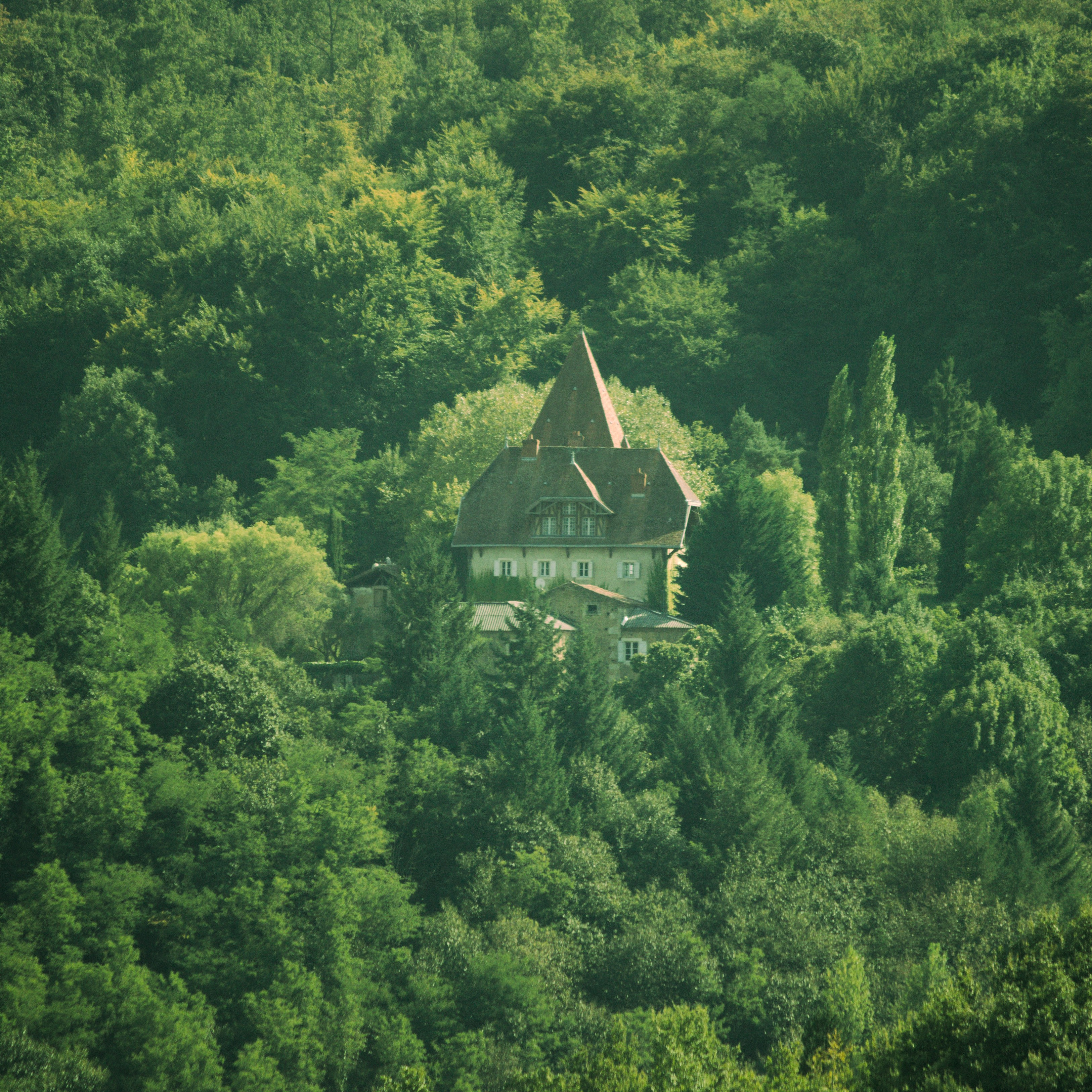 Château de Poudelay .